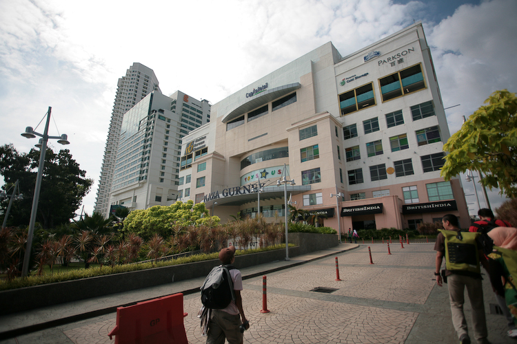 Gurney Plaza Exterior